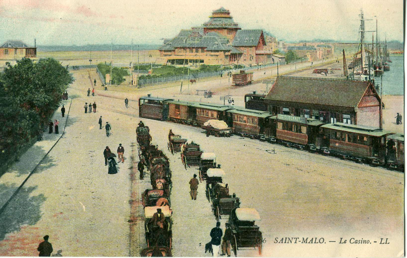 Carte postale ancienne éditée par ND, n°6 : SAINT-MALO - Le Casino